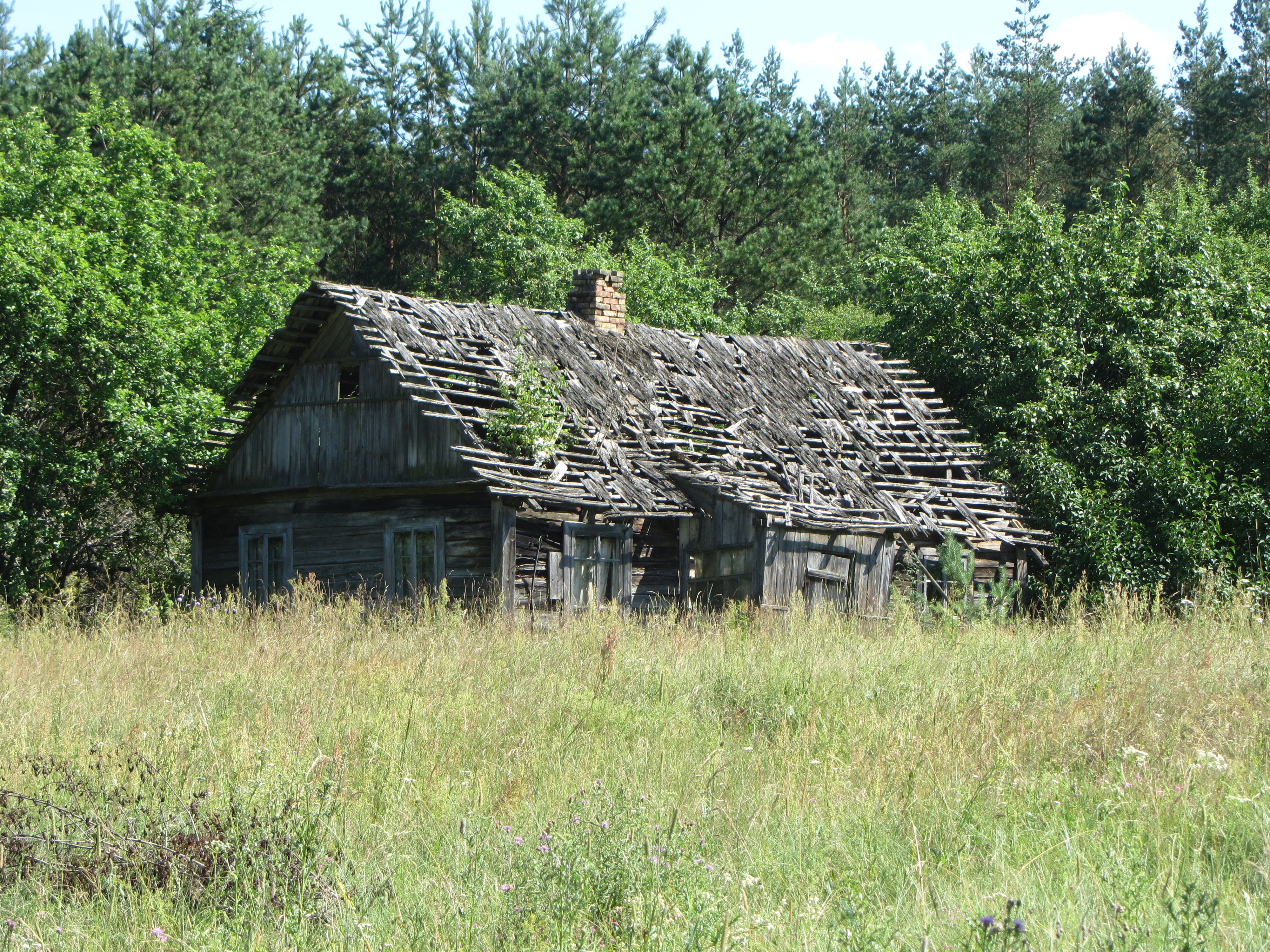 Kaniavos sen., Lithuania